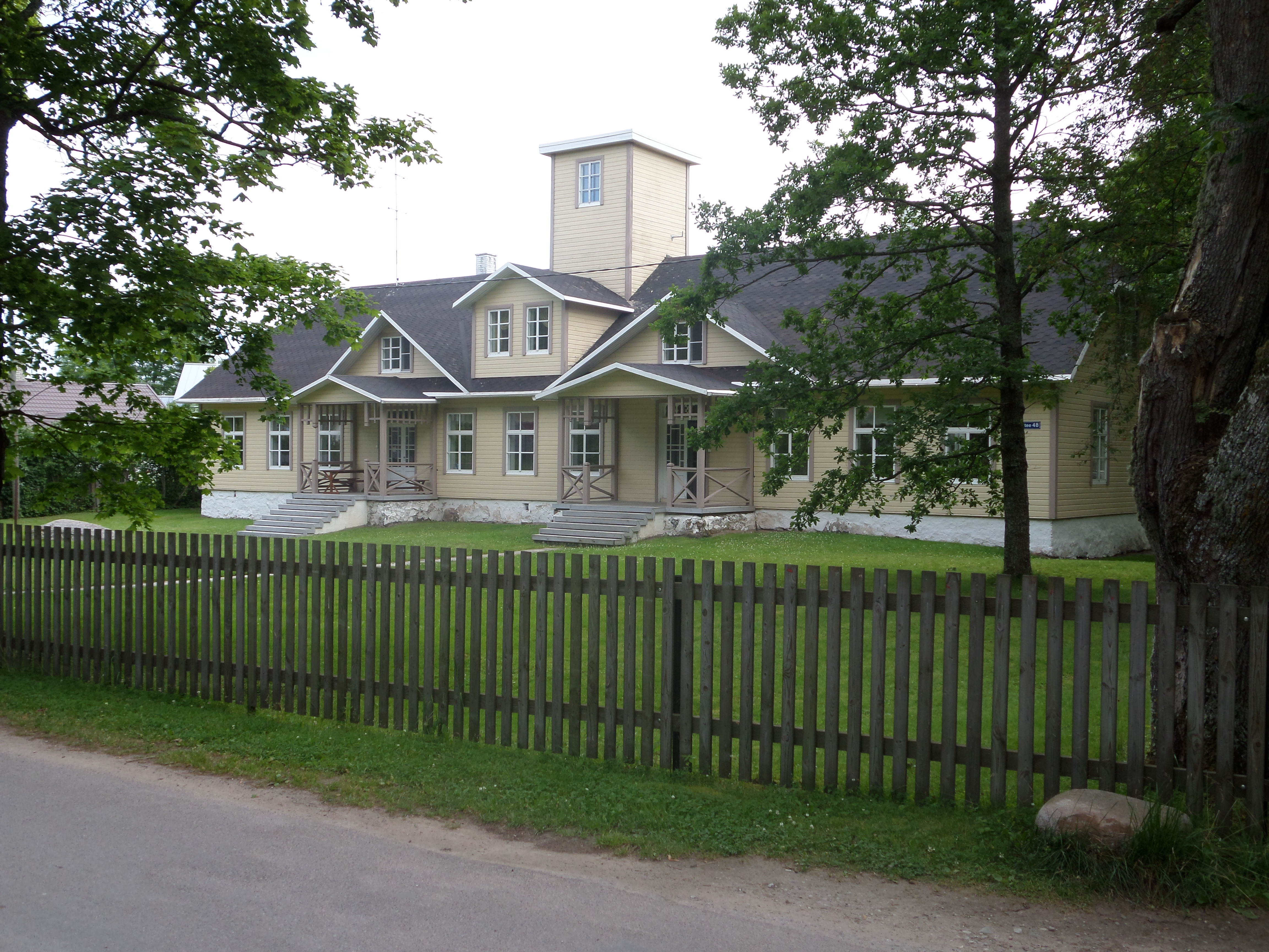 Käsmu merekool